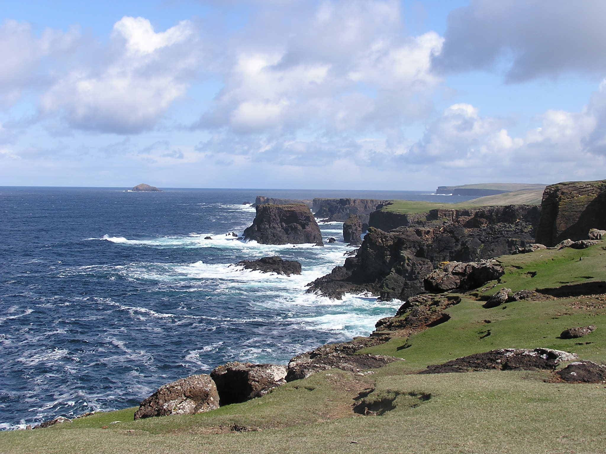 Klippenküste bei Eshaness, Mainland, Shetlands